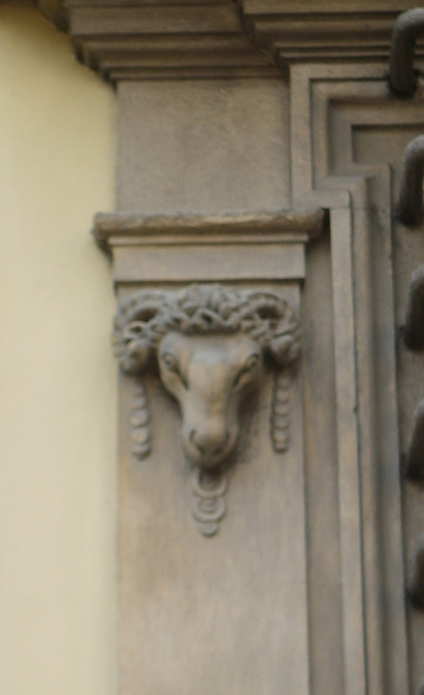 Casino di san marco, dettaglio 11